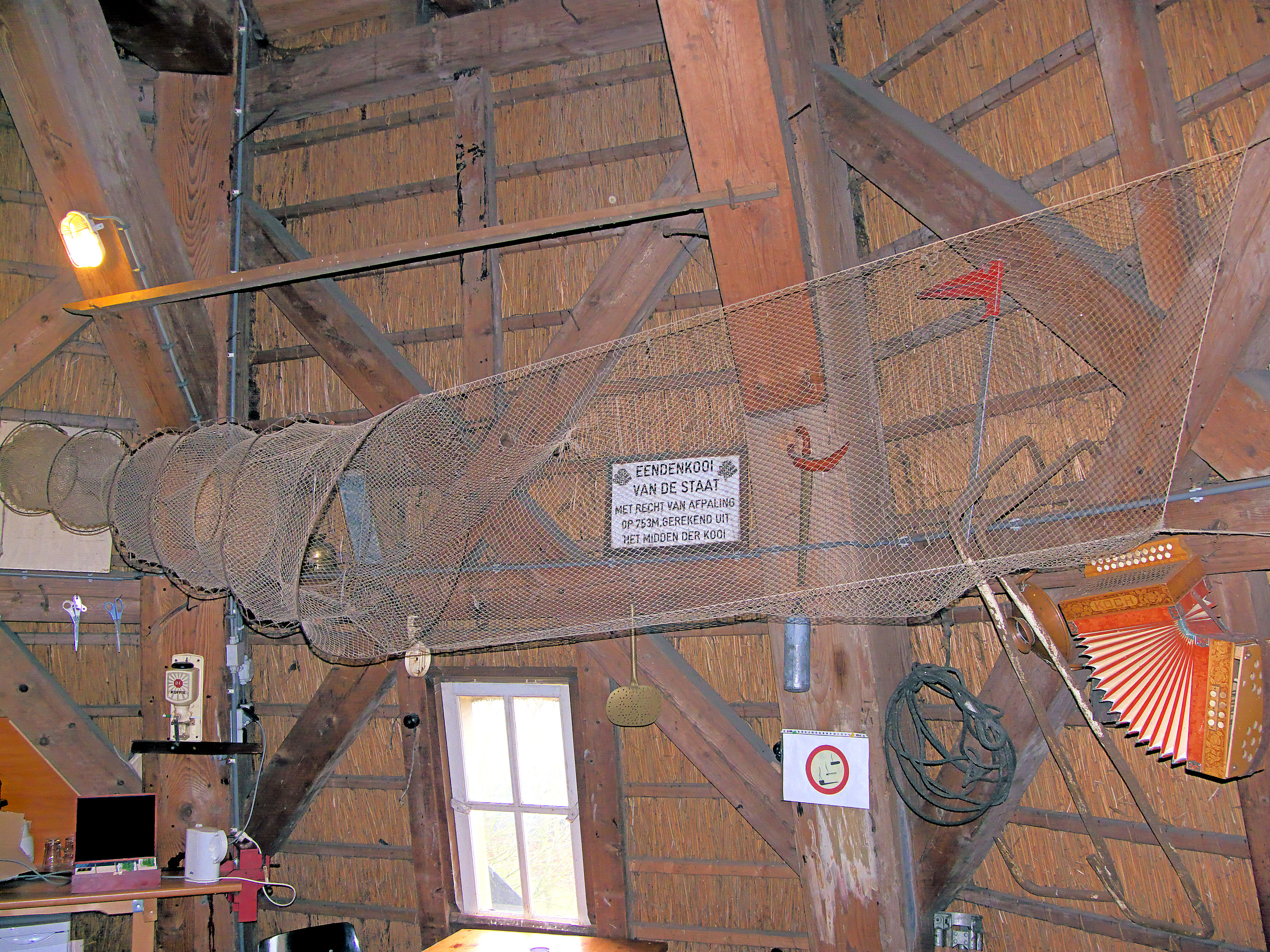 Poldermolen Waardenburg, interieur achtkant met o.a. palingfuik